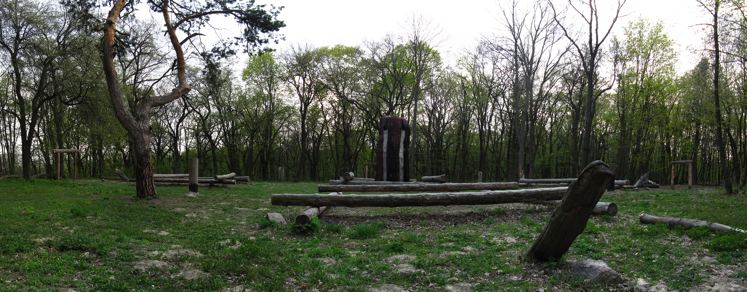 Загальний вигляд капища на Лисій горі